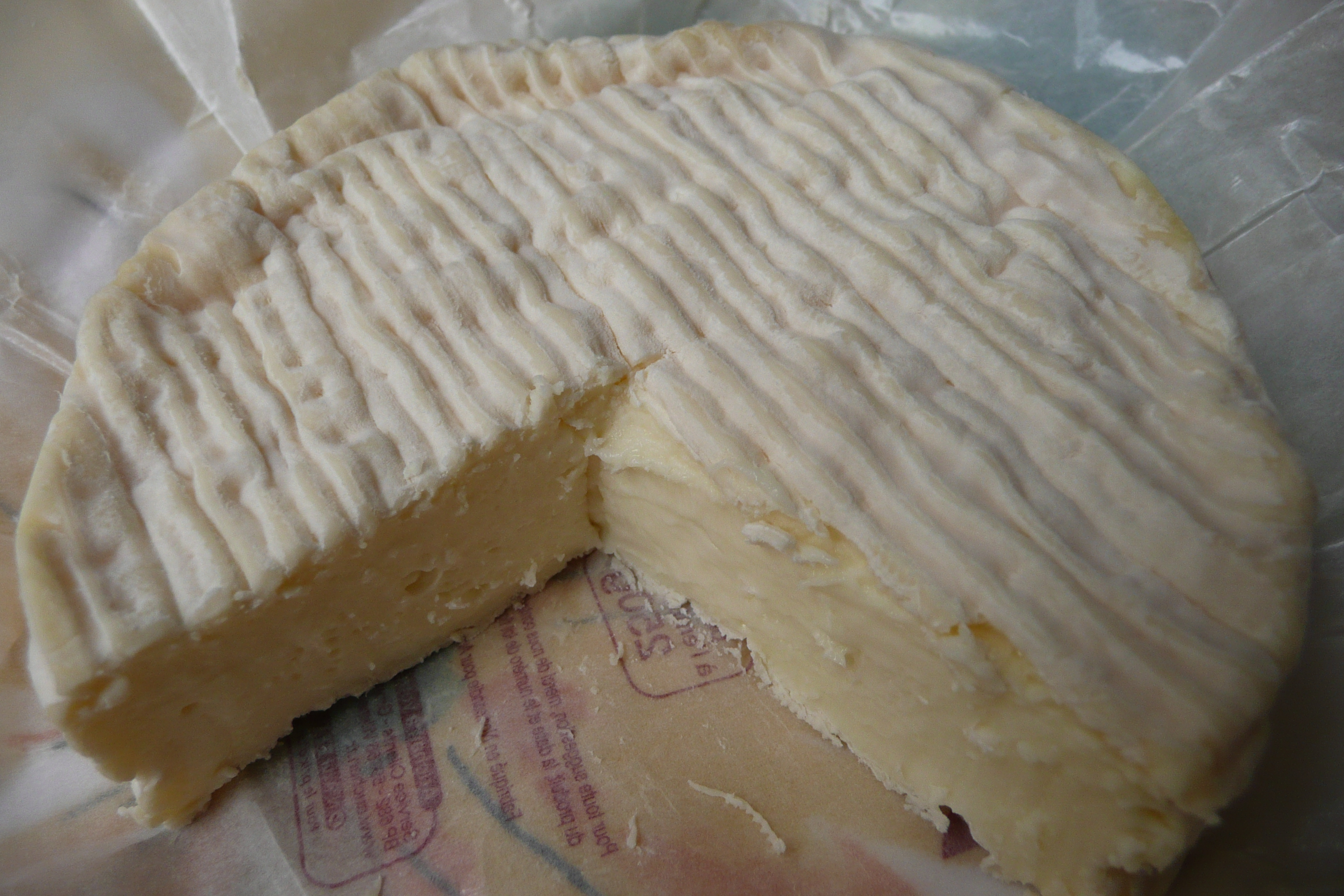 Camenbert fermier 250 grammes.